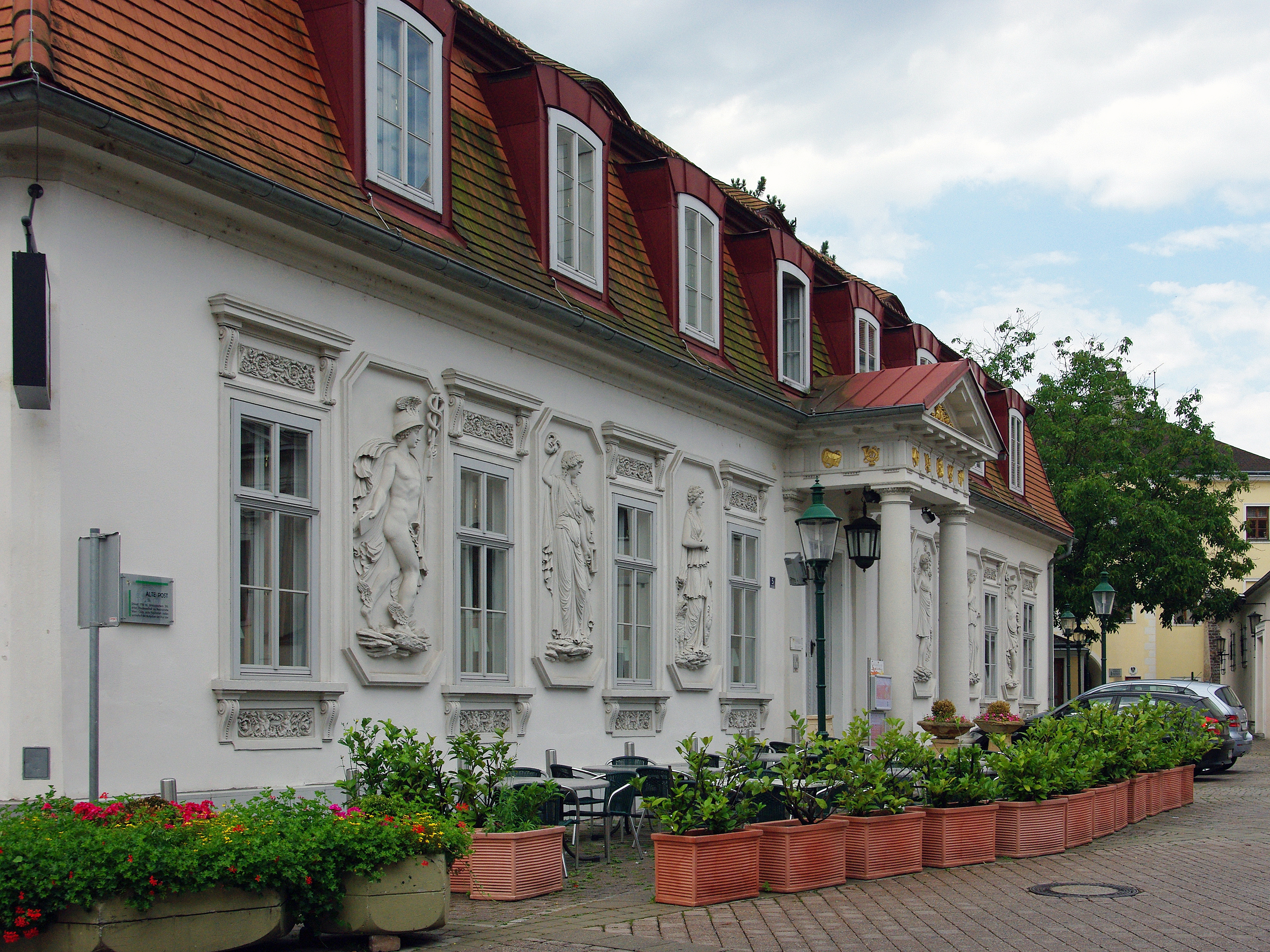 Ehem. Fürnbergsche Poststation